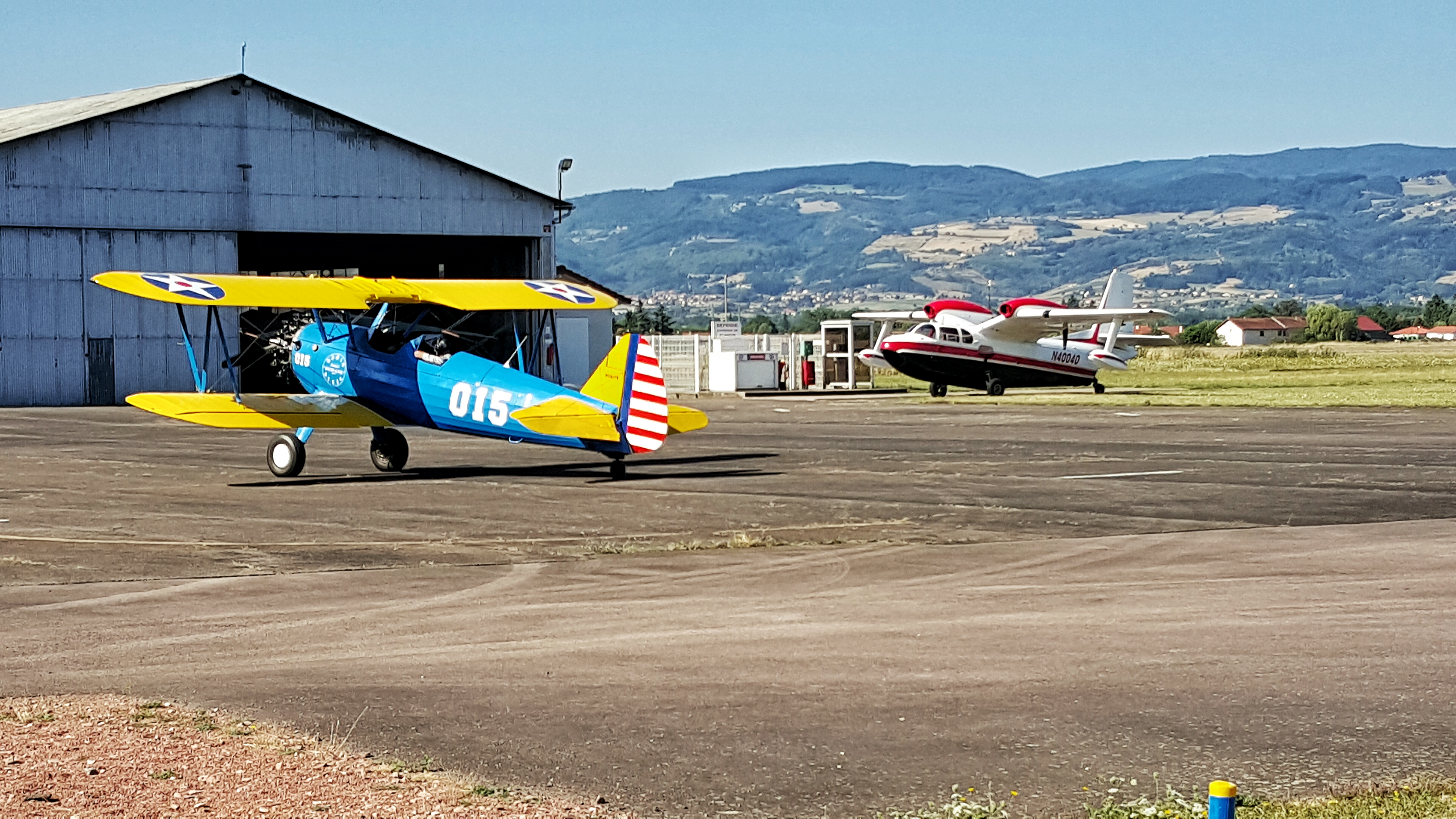 Un avion bi-plan Boeing-Stearman Model 75 avec un Hydravion Piaggio P.136-L2